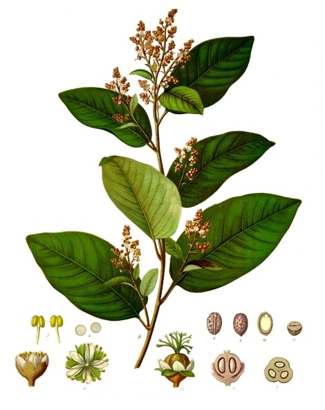 Kaskarillabaum. Croton Sloanei Benn. A blühender Zweig in natürlicher Grösse. 1 männliche Blüthe, vergrössert; 2 dieselbe von oben gesehen, desgl.; 3 Staubgefässe, desgl.; 4 Pollen, desgl.; 5 weibliche Blüthe, desgl.; 6 Fruchtknoten im Längsschnitt, desgl.; 7 derselbe im Querschnitt, desgl.; 8 und 9 Same von der Bauch- und Rückenseite, desgl.; 10 und 11 derselbe im Längs- und Querschnitt, desgl.